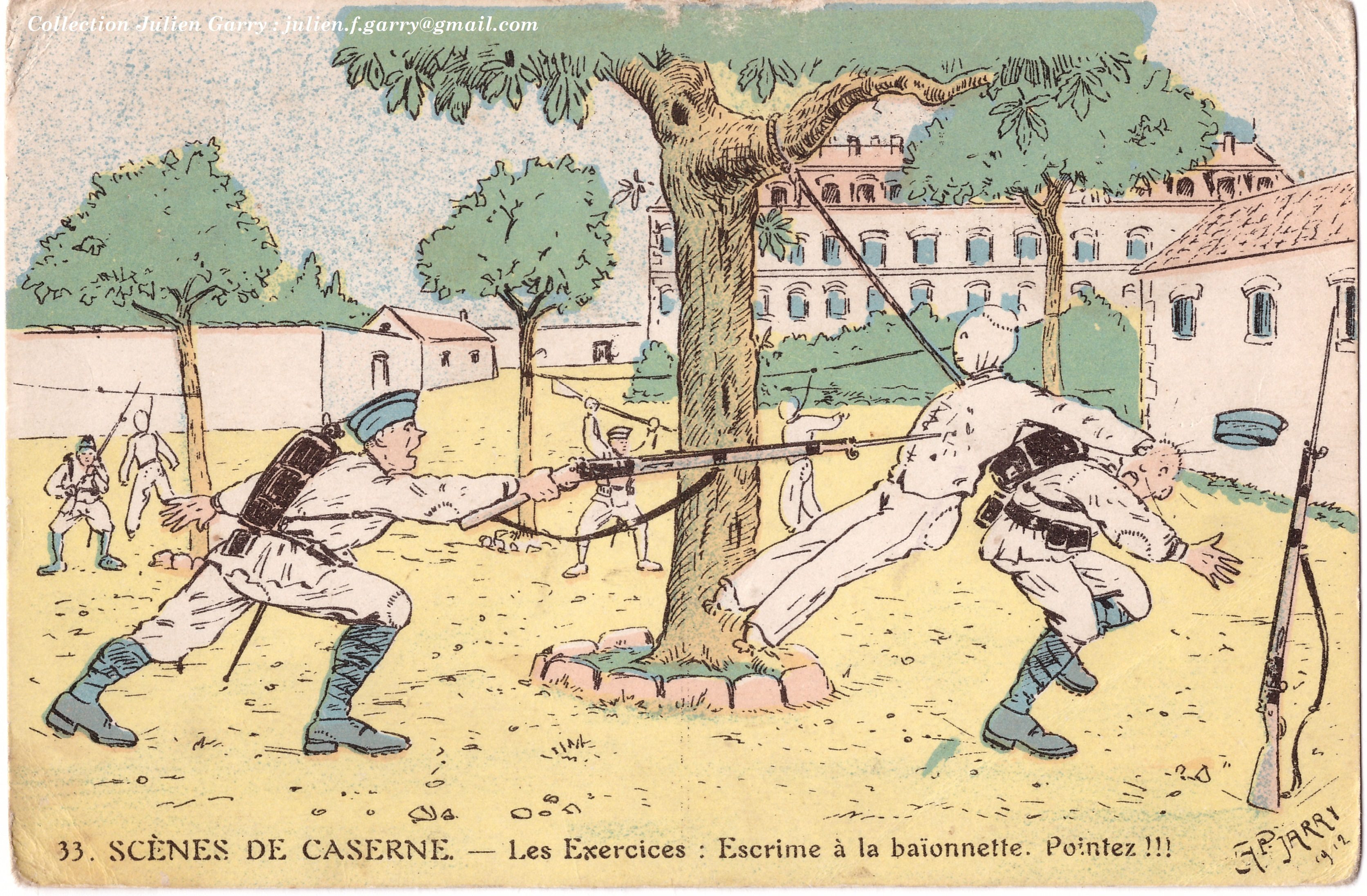 Numérisation d'une ancienne carte postale satyrique sur l'escrime à la baïonnette